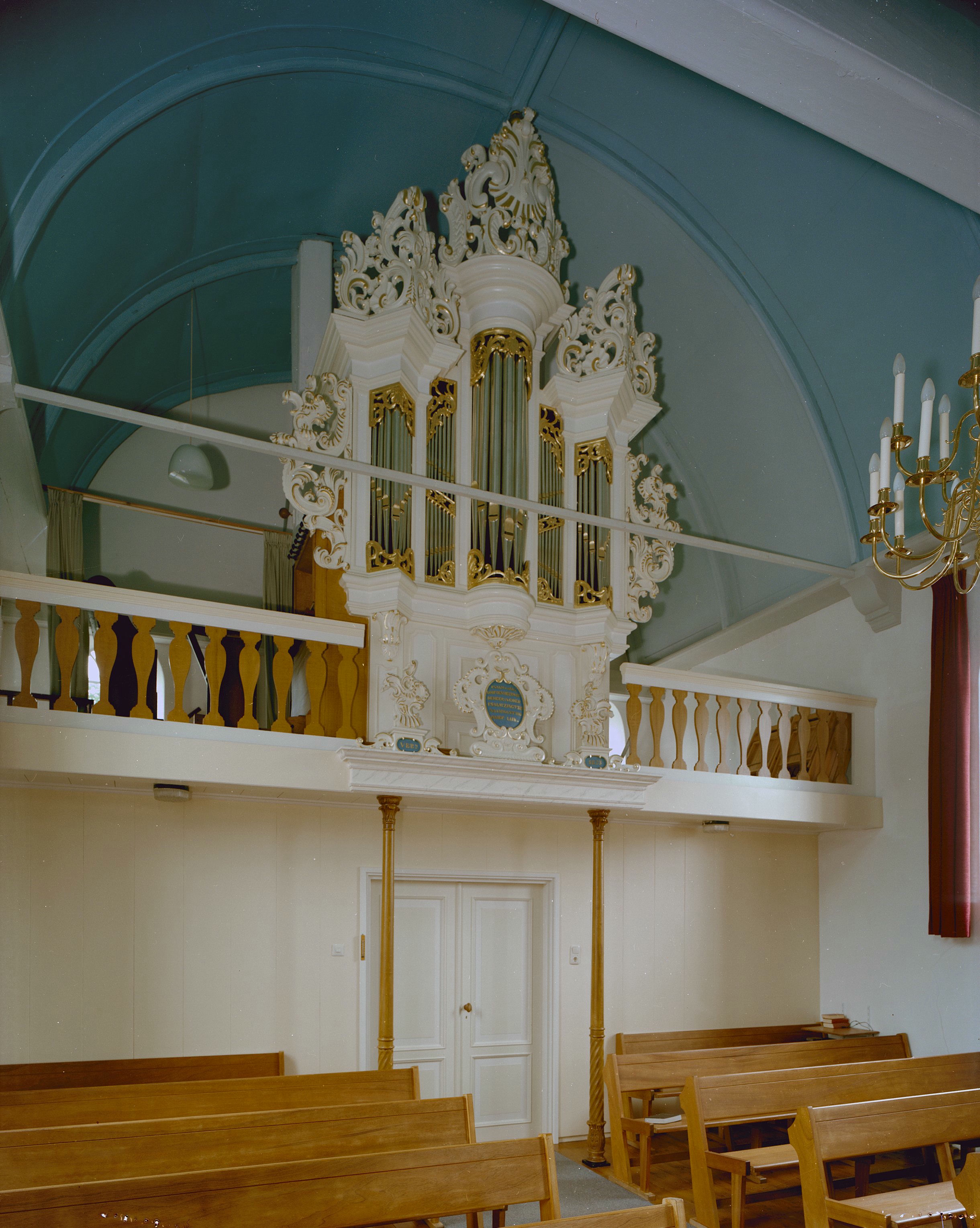 Nederlands Hervormde Kerk: Interieur, aanzicht orgel, orgelnummer 614 (opmerking: Gefotografeerd voor Het Historische Orgel in Nederland 1726-1769, bladzijder 136)